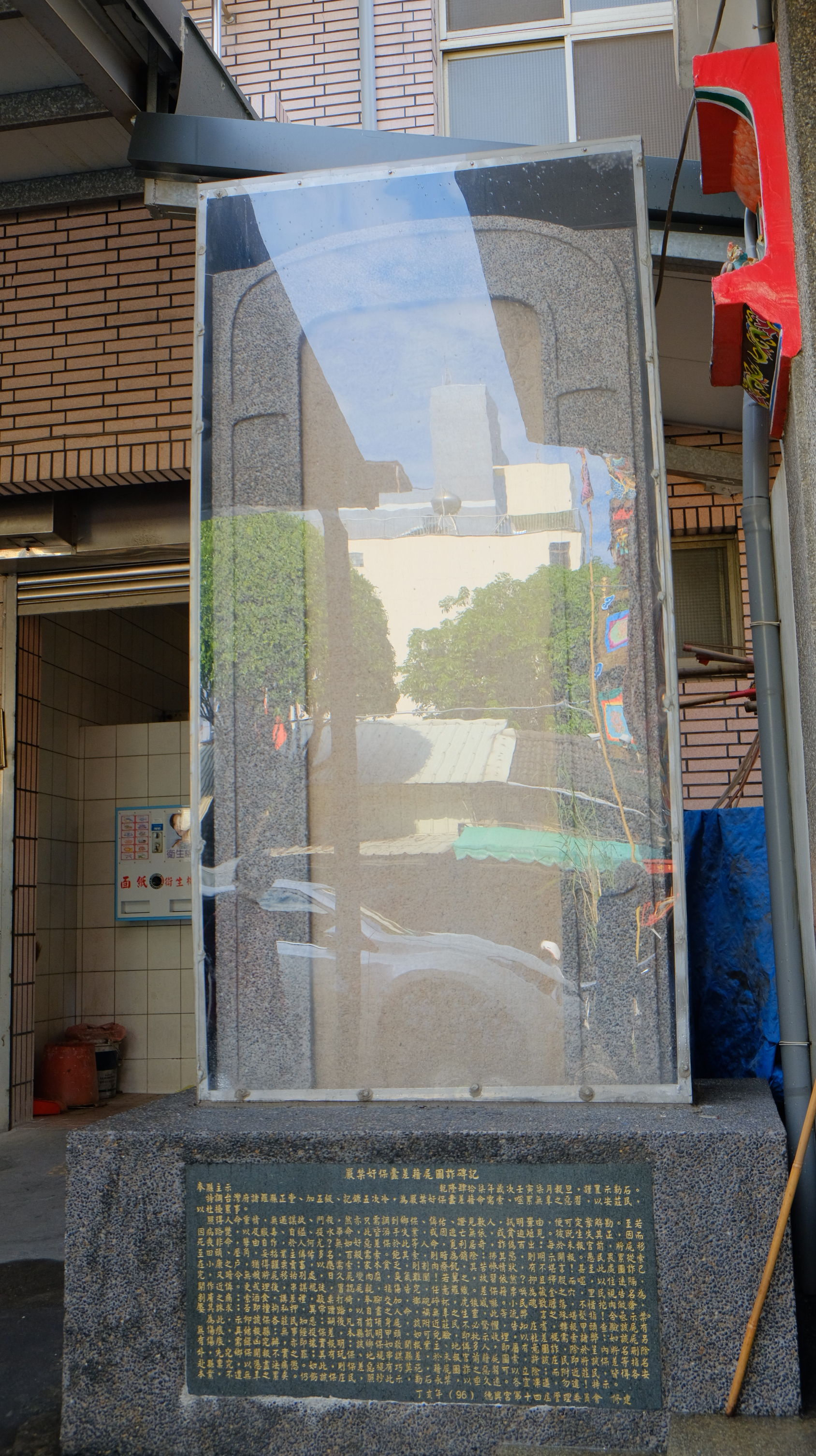 中文（台灣）: 2019 Huwei Dexing Temple 嚴禁奸保蠹差藉屍圖詐碑記 碑文 特調臺灣府諸羅縣正堂、加五級、紀錄五次冷，為嚴禁奸保蠹差藉命需索、噬累無辜之惡習，以安莊民，以杜擾累事。 照得人命重情，無過謀故、□殺；然亦只吊到鄉保、僯佑、証見數人，訊明釁由，便可定案解勘。至若因病路斃，以及服毒、自縊、投水畢命，此皆游手失業，或因逃亡無依，或因貧迫短見。彼既生失其正，因而死喪非命，孽由自作，於人何尤？無如奸惡差保於此等人命，覓利居奇，詐偽百出；每於未報官前，將屍移置田頭、屋角，妄指業主僯佑多名，百般需索。飽其索，則暗為銷除；拂其慾，則明示開報。愚民畏累從索，在小康之戶，猶得糶粟賣畜，以應需索；家本貧乏，則割肉療饑。其苦慘情狀，有不堪言！甚至此處圖詐已完，又暗令無賴將屍抬移別處，日久屍變肉腐，臭穢難聞！若冀之，故習依然？抑且擇殷而噬，以住遠隔，開作近僯。更或埋後，串謀棍徒，冒認屍親，指傷告究，任意羅織。差保藉票喚為藏金之穴，里民視告名為剝膚之痛：索酒食、講差禮，敲桌打椅、拳腳交加，擲碗碎盃、虎狼威嚇。小民魄散膽落，不利挖肉做瘡，饜其誅求；否即擅拘私押，異常蹧踏。以自盡之人命，禍無辜之生靈；此等流弊，言之殊堪髮指！合亟示禁。 為此，而仰該保各庄民知悉：嗣後凡有前項身屍，該附近庄民不必驚懼；告知庄耆，轉報甲頭查驗該屍有無傷痕，具結報縣。無事經投保差，本縣訊明甲頭，如何免驗，即批示收埋，以杜差擾需索諸弊；如該屍另有傷痕，須緝兇究辦，亦即據寔報明。該郷保如敢開報業主、地僯多人，即屬有意圖詐；即於呈內將名刪除外，先究郷保開報不實之罪。其有玩保、地棍串謀縣差，於未報官前藉屍圖索；許該庄民即將該保差等指名赴縣稟究，以憑盡法痛懲。如此，則保差惡棍有巧莫施，借屍圖詐之惡習可以立除；而附近庄民，皆得各安本業，不遭無辜之累矣。仍飭該保庄民，照抄此示，勒石永禁，以垂久遠，各宜凜遵，民違！特示。 董事翁保、林旭、吳□□、鍾□□。庠生張健侯捐銀四員，監生王日登捐銀弍兩。庄耆：陳省捐銀弍員，林申捐銀壹兩、吳泉捐銀壹兩、吳畏捐銀壹兩。陳鍾合、翁四九、王版生、翁光成、郭傳祖、劉觀海、王天德、吳德麒、吳元成、劉政理、吳聖、蘇玉、張教、鍾□、施報、呂律、鍾泵、林恭、鍾城、陳連、戴海、陳萬、陳賽、王俊、楊斗，各捐銀壹員。莊騫意、王德安、陳媽定、翁助印、翁娘愛、謝光烈、王耀祖、劉林養、程傳祖、林光助、王光瑗、吳英、翁進、黃信、郭景、陳聽、呂樹、吳張、劉屘、蘇忽、侯溪、陳漢、王笑、趙寶、林逞、劉捷、戴萬、陳雅、吳斌、陳厚、謝鞍、林添、吳□、蘇祐、翁□、王恭和，各捐銀□□。 乾隆肆拾柒年歲次壬寅秋柒月穀旦，謹置示勒石。